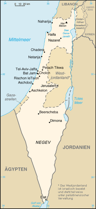 Karte Israels, CIA World Factbook, übersetzt (Original text: Karte Israels, abgewandelt, neuester Stand,) Urheber=Hoheit (¿!)